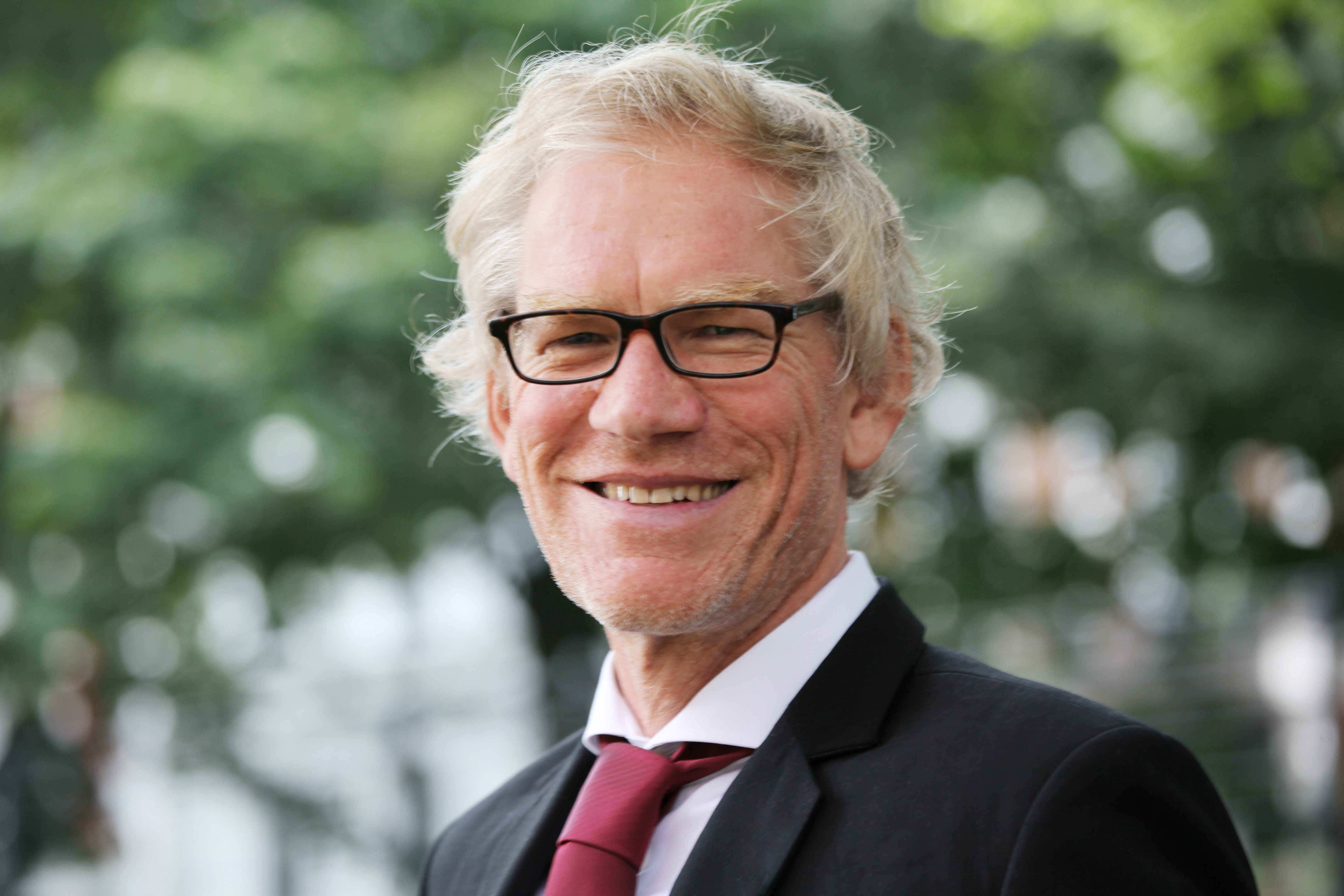 Markus Teutschbein, Leiter der Wuppertaler Kurrende